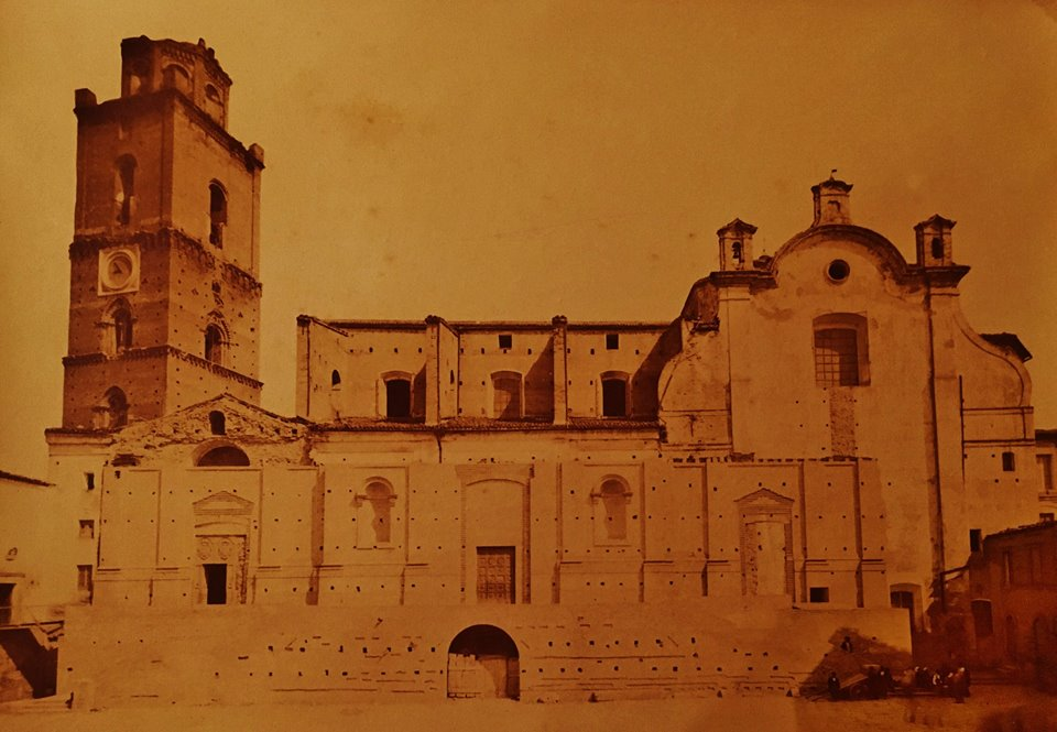 L'aspetto della cattedrale di san Giustino di Chieti in precedenza al restauro degli anni 1920